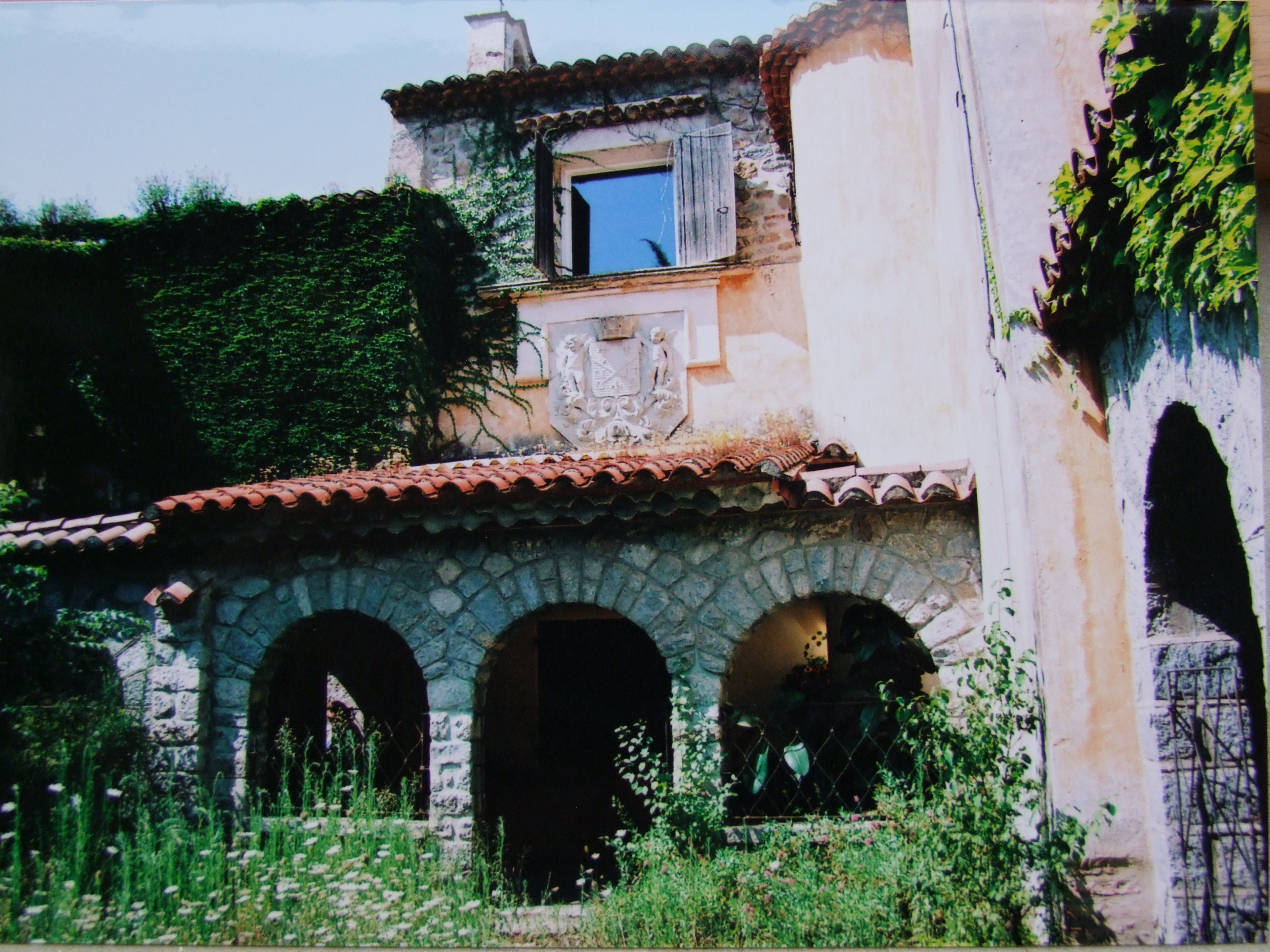 Galerie nord au pied du chevet-tour de la chapelle des Capucins,jusqu'à l'été 2015.Baie vitrée,armoiries de Céret,et arches sont dues à Alfred Joffre,architecte des M.H et propriétaire vers 1935-1950.Photo originale en argentique provenant du travail personnel du même auteur que le présent tirage en numérique.